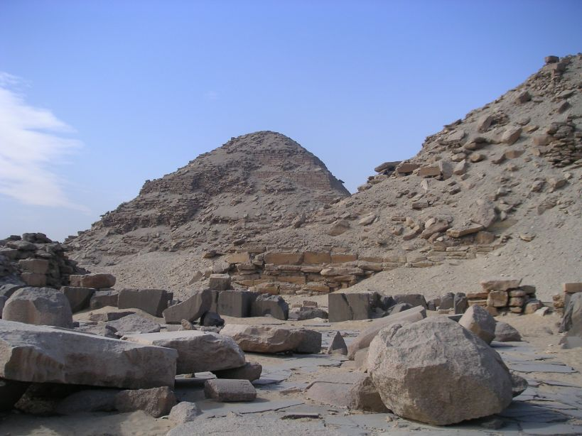 Vue de la pyramide de Neferirkarê prise depuis le temple funéraire de Niouserrê - Ve dynastie égyptienne - Abousir